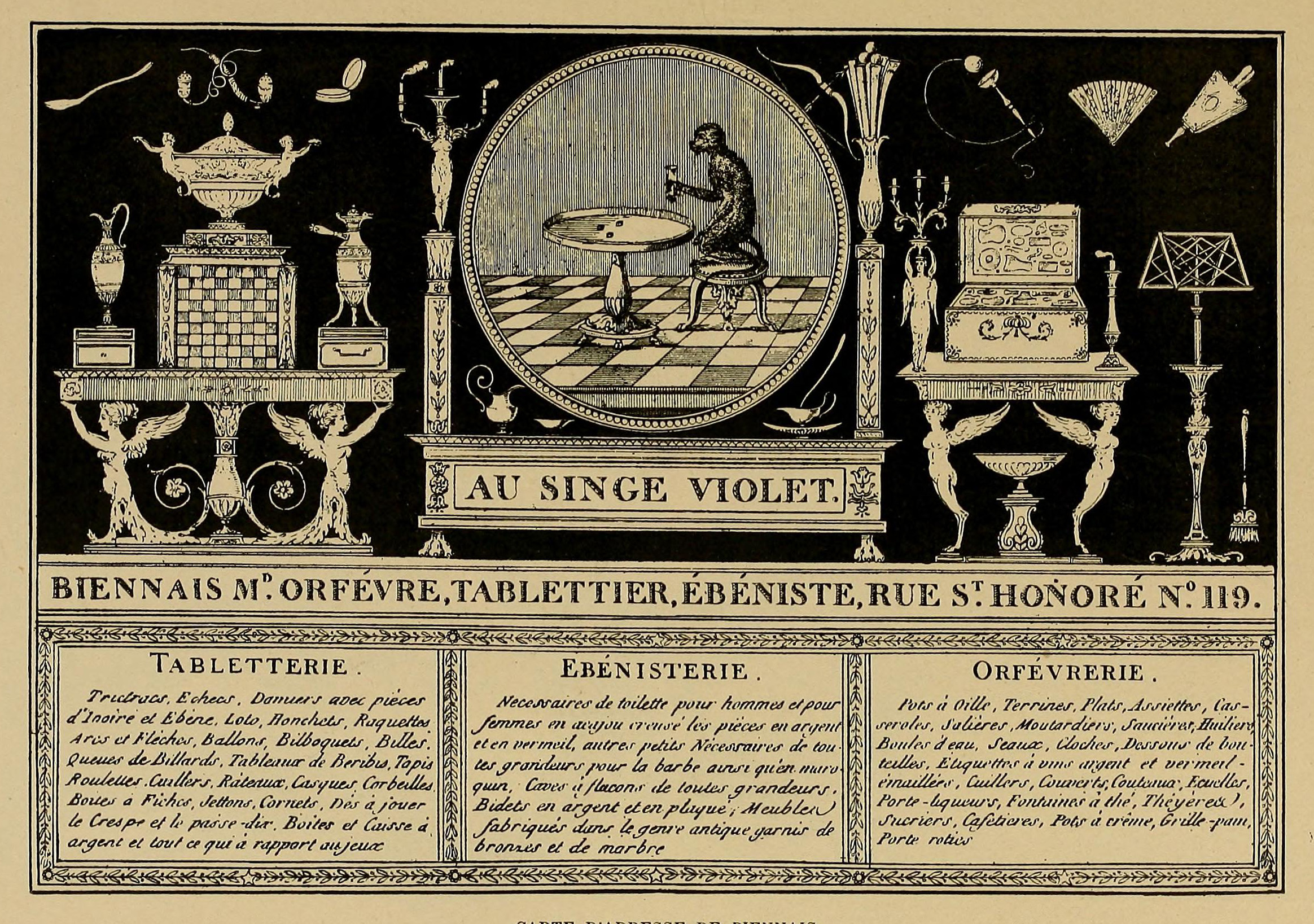 Illustration from Histoire des jouets